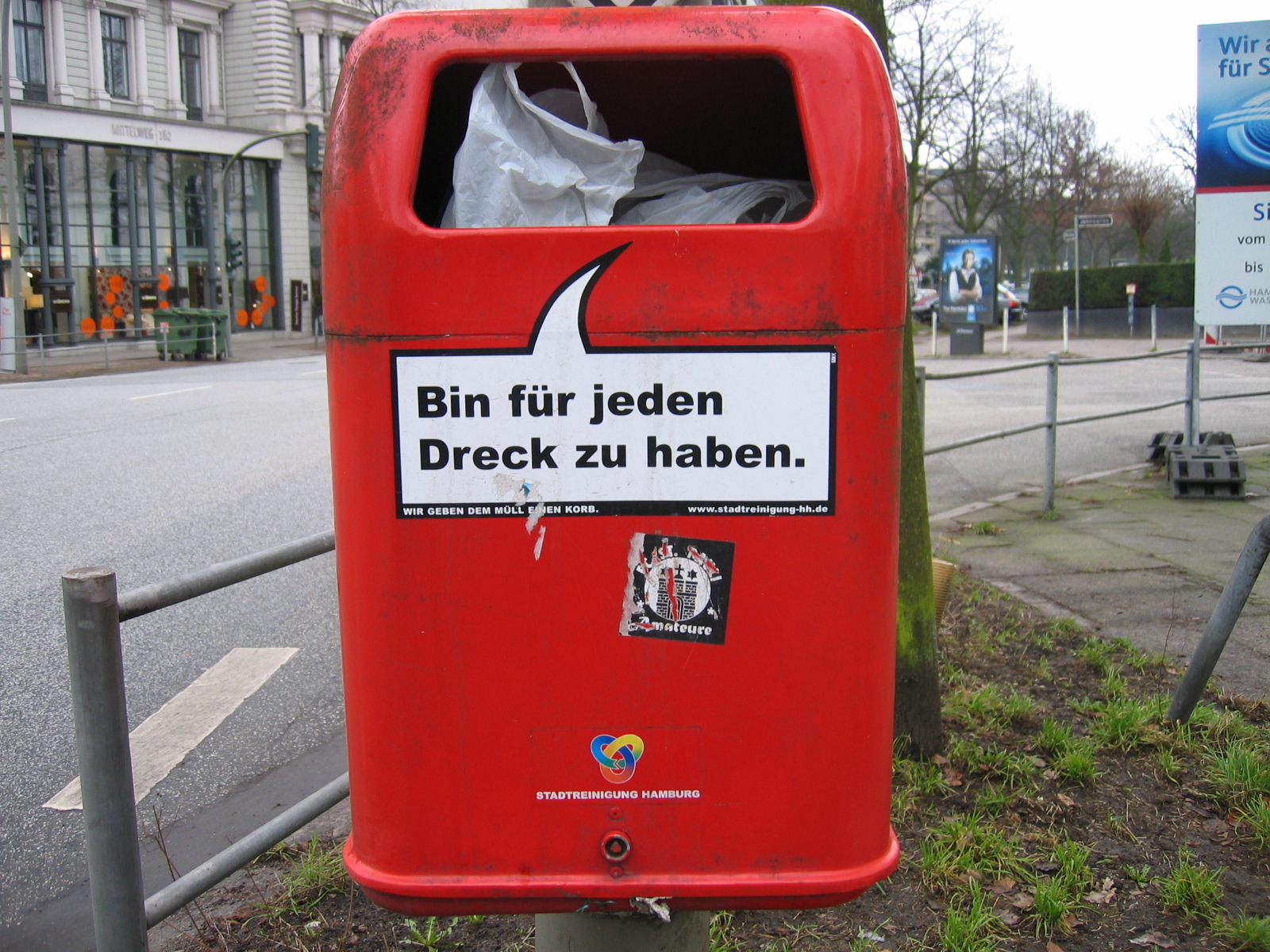 "sprechenden" Mülleimer und Papierkörbe der Stadtreinigung Hamburg